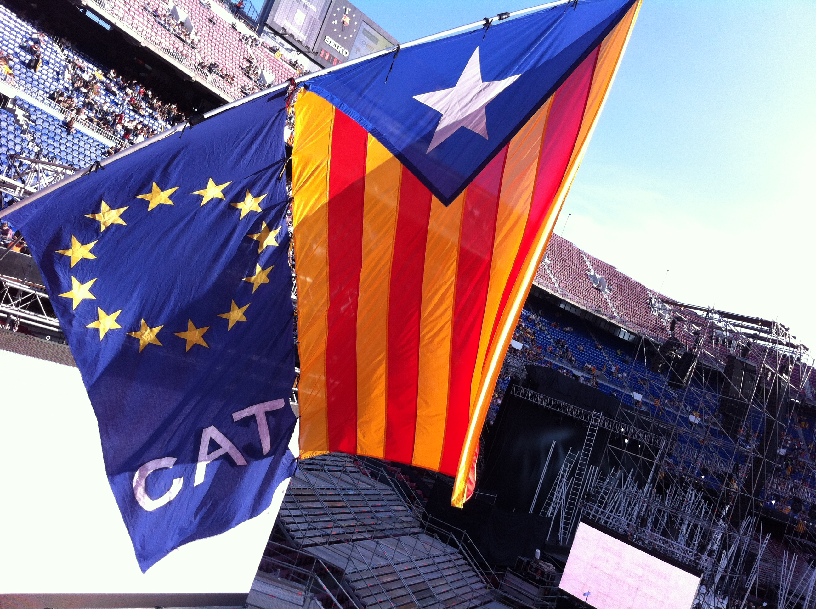 Concert per la Llibertat, Barcelona, 29 de juny de 2013